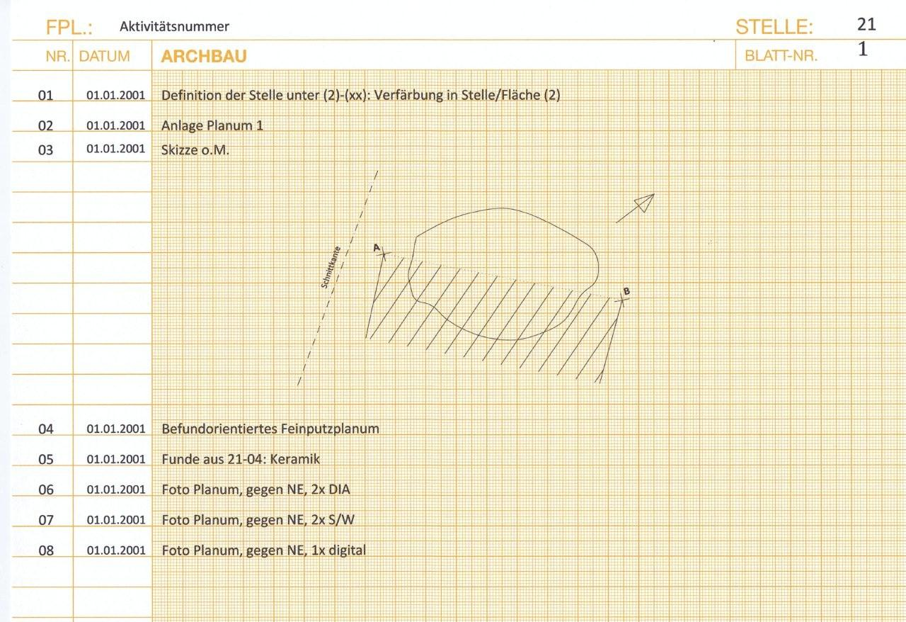 Beispiel für eine Stellenkarte des Rheinischen Stellensystems zur Dokumentation archäologischer Ausgrabungen.